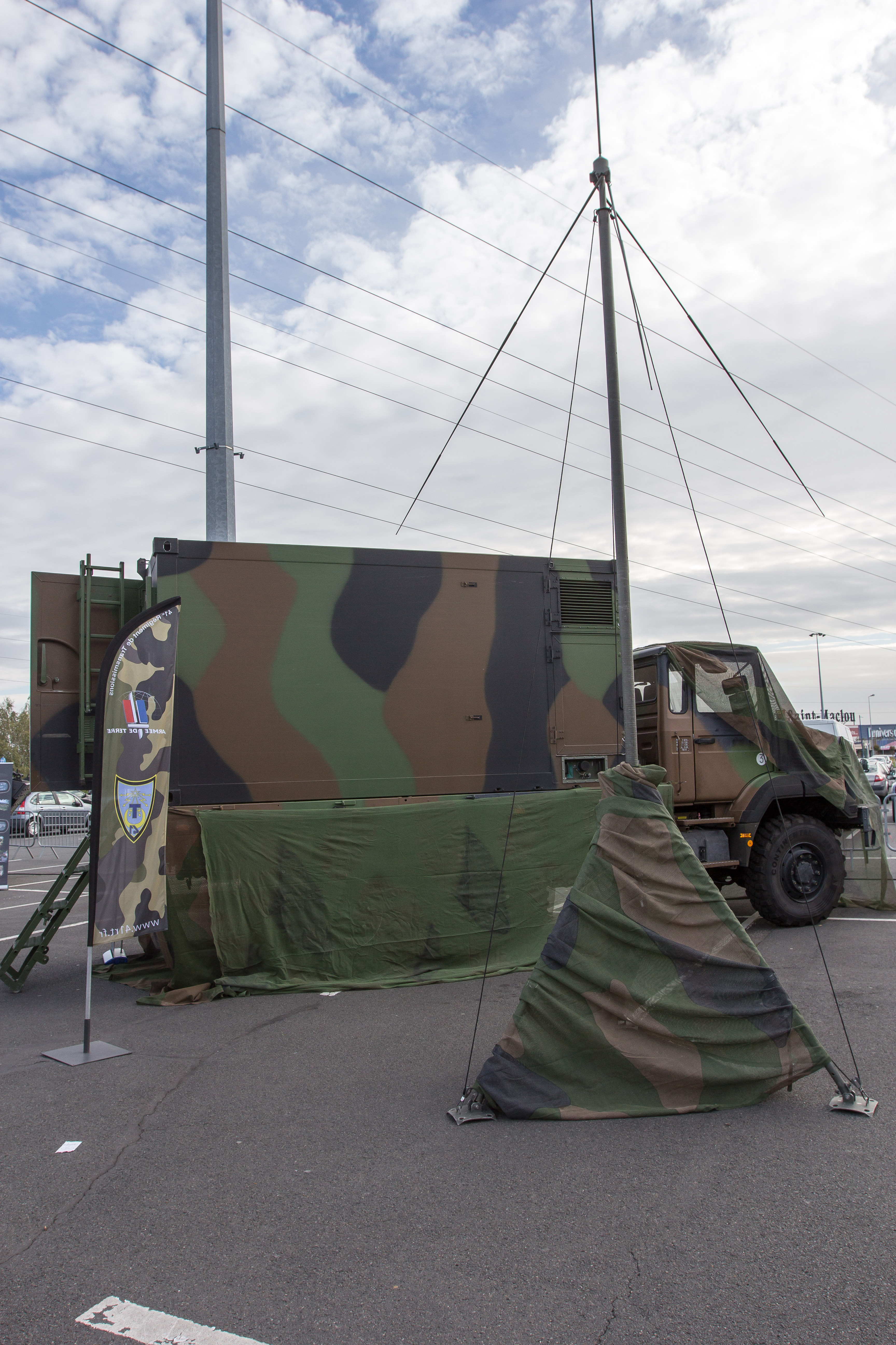 Matériel présenté lors de l'exposition "Les forces armées s'invitent à villabé", du 23 au 25 octobre 2014 au Centre commercial Villabé A6 / Villabé / Essonne / France